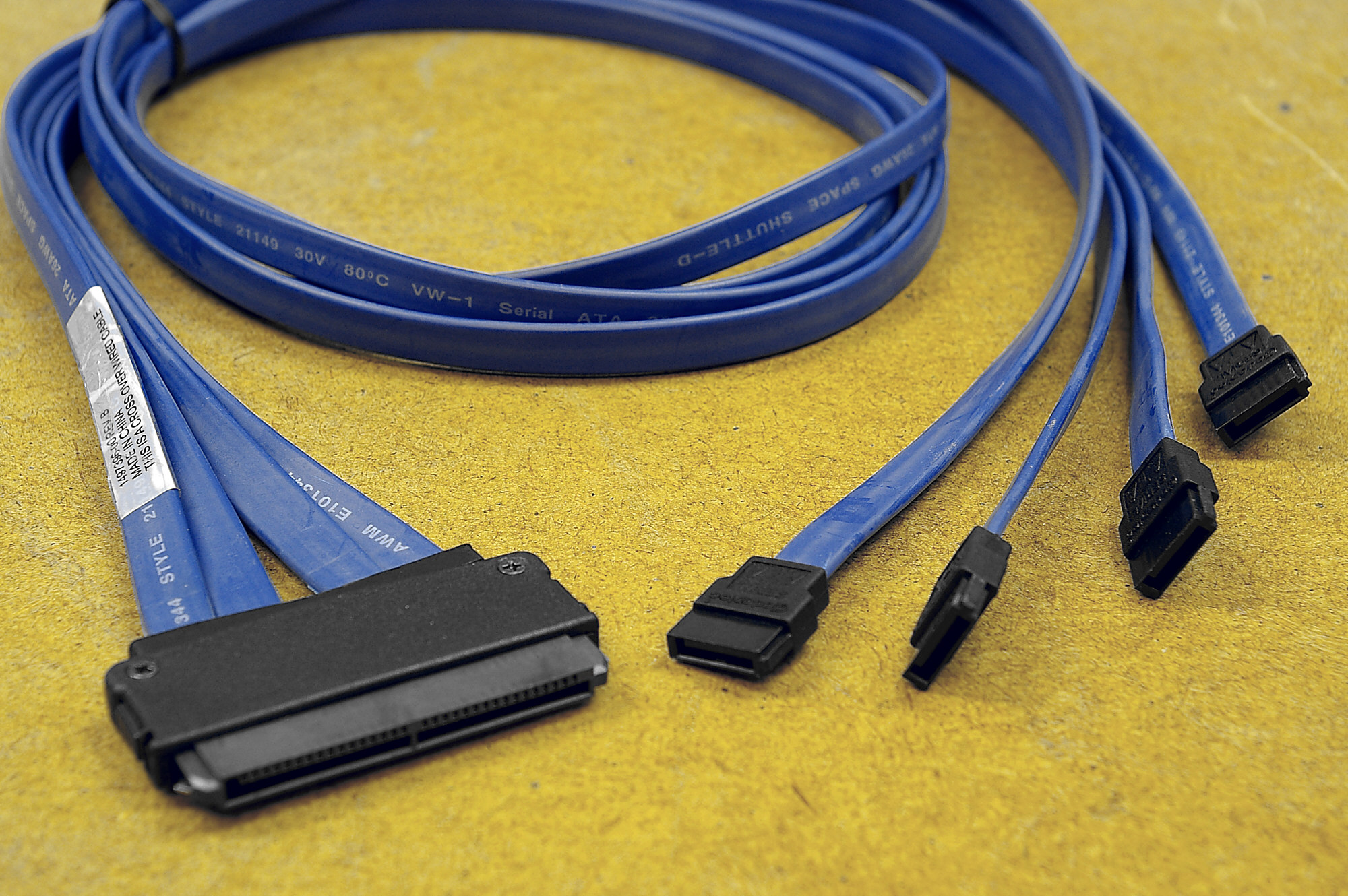 SAS Vierfach-Anschlußkabel intern nach SFF-8484